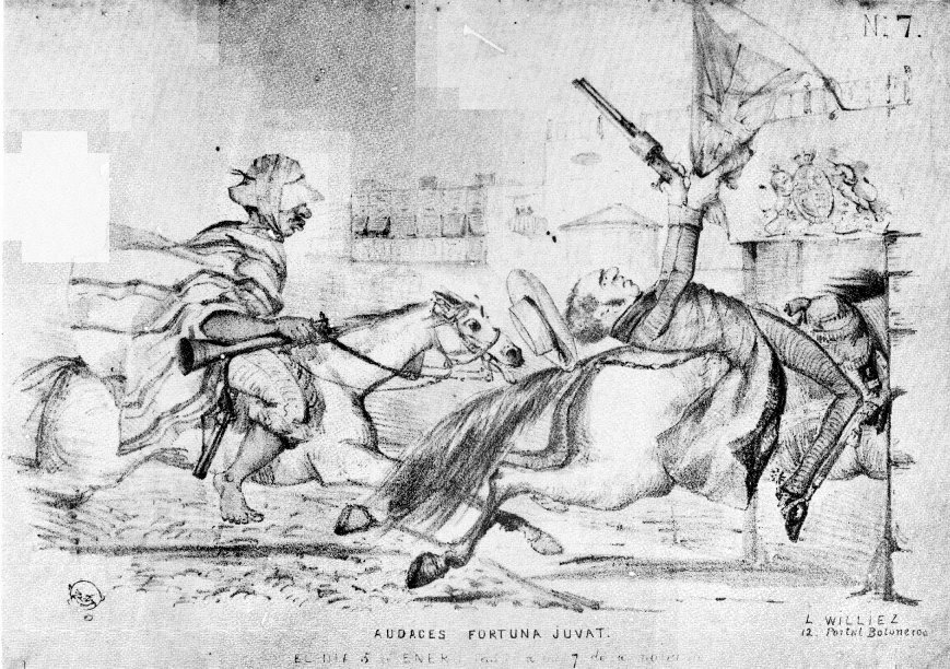 Caricatura de León Williez sobre la huida del presidente Echenique, luego de la batalla de La Palma (1855)